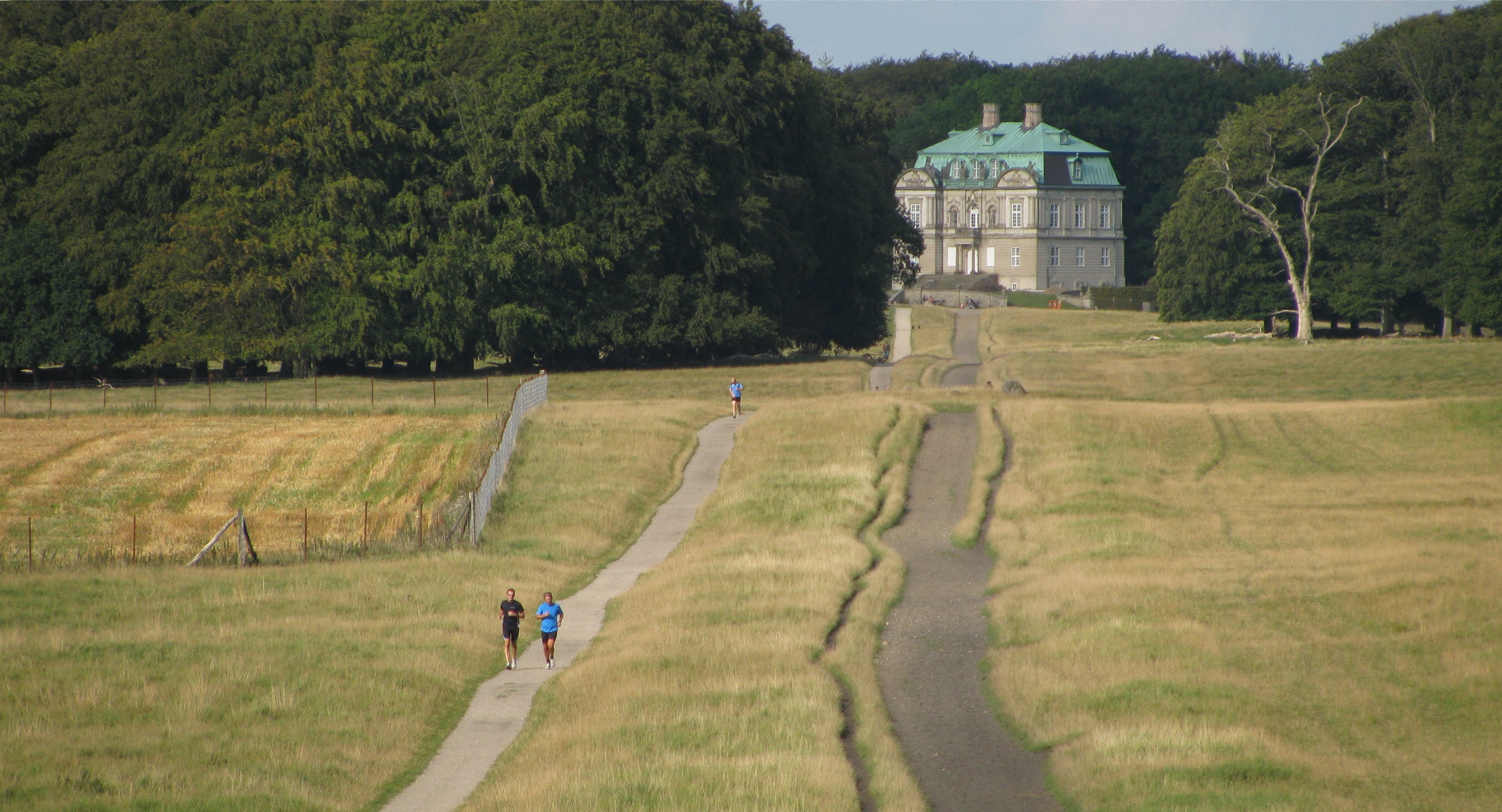 Dyrehaven, Eremitageslottet